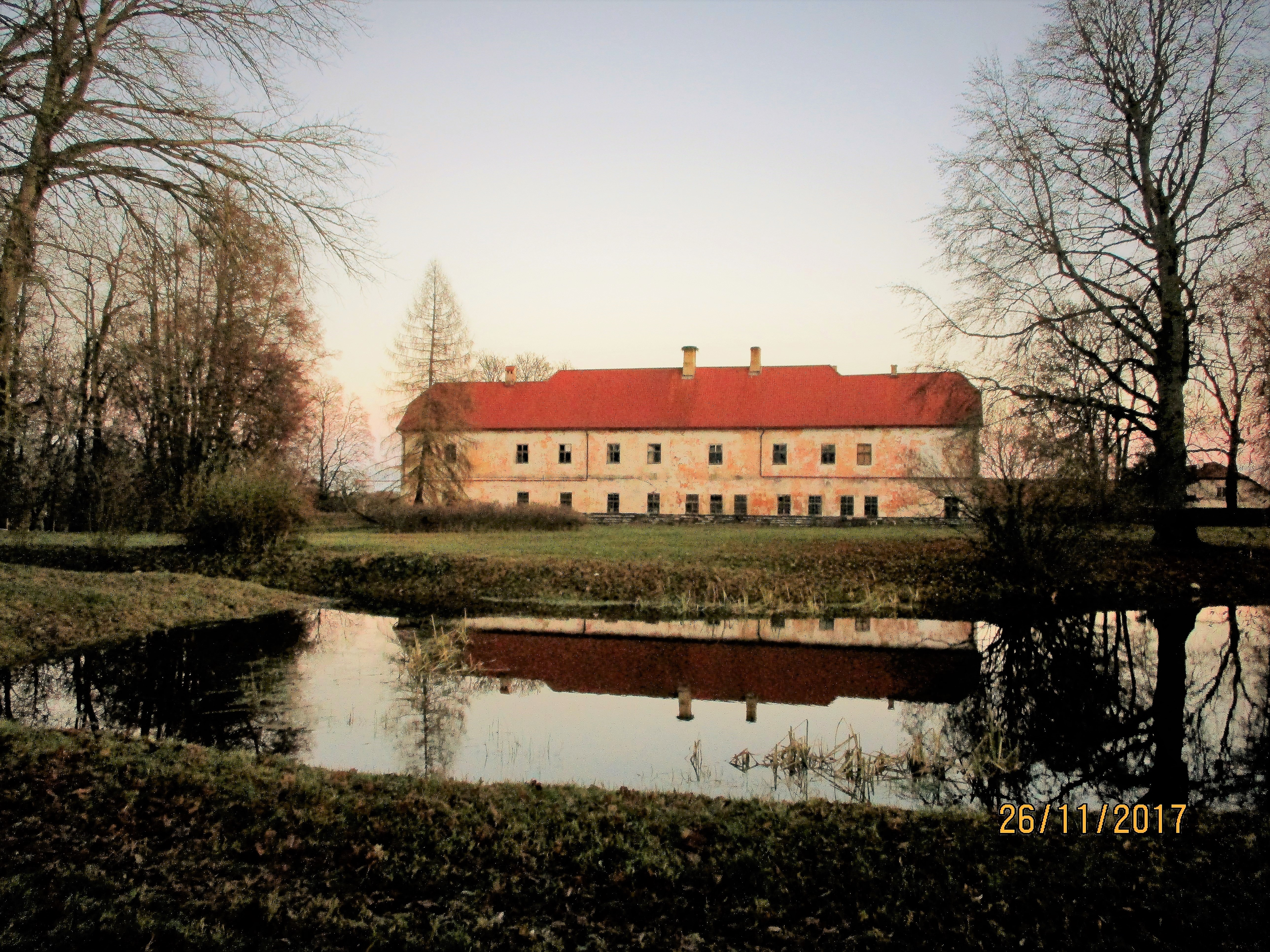 Vaade lääneloodest üle tiigi mõisa peahoonele, mis sisaldab endas ka linnusetiiba ja -müüre.